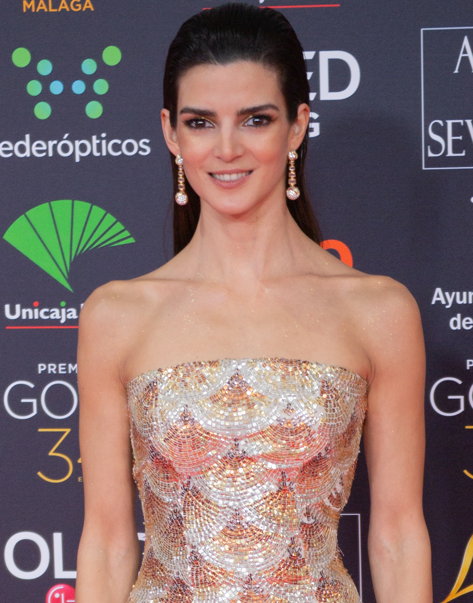 Clara Lago en la alfombra roja de la ceremonia de entrega de los Premios Goya 2020, celebrados en Málaga